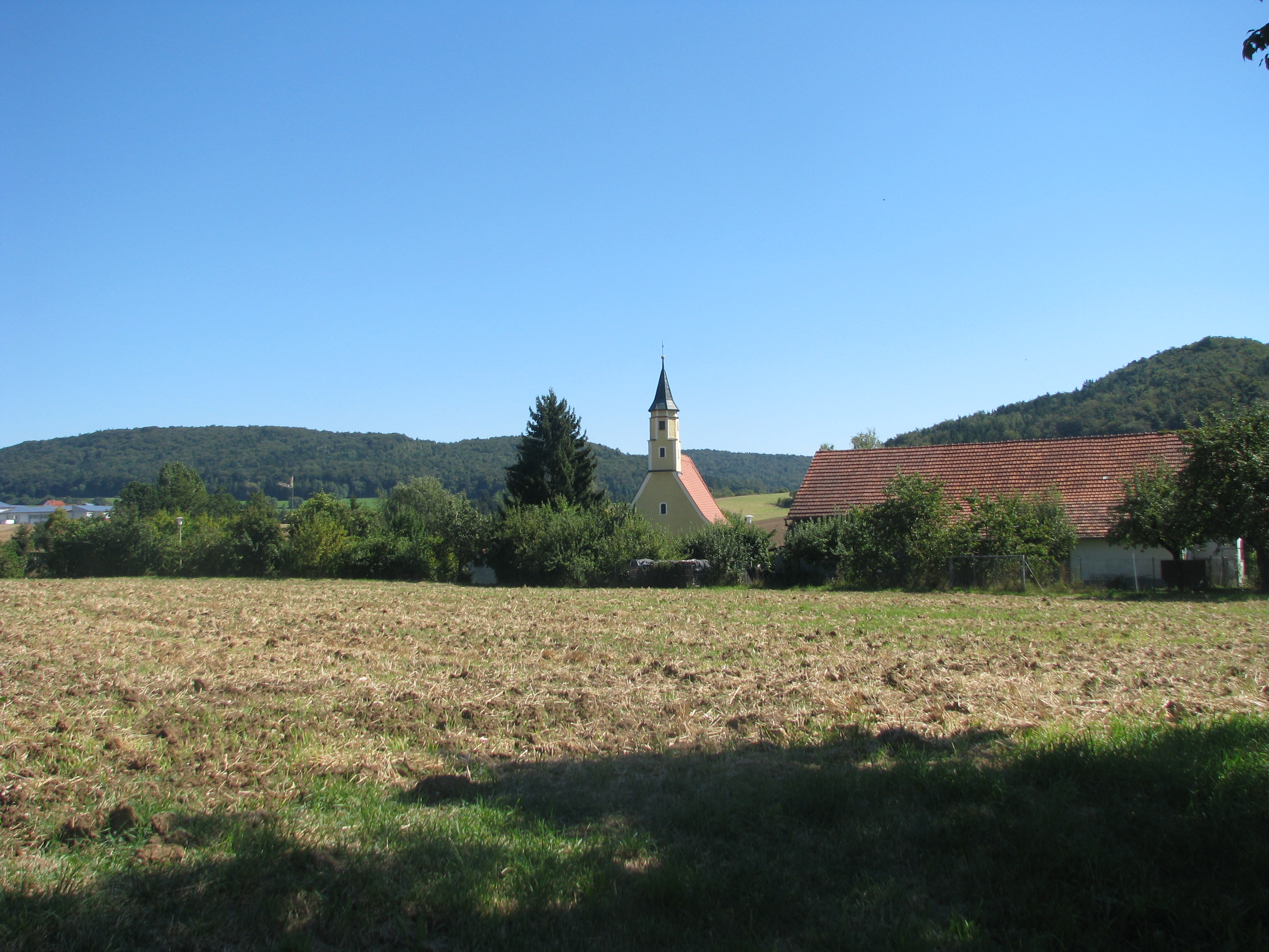 Altenveldorf, Ortsteil von Velburg im Lanskreis Neumarkt i. d. Opf.